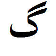 Der persische Buchstabe Gaf in isolierter Form.